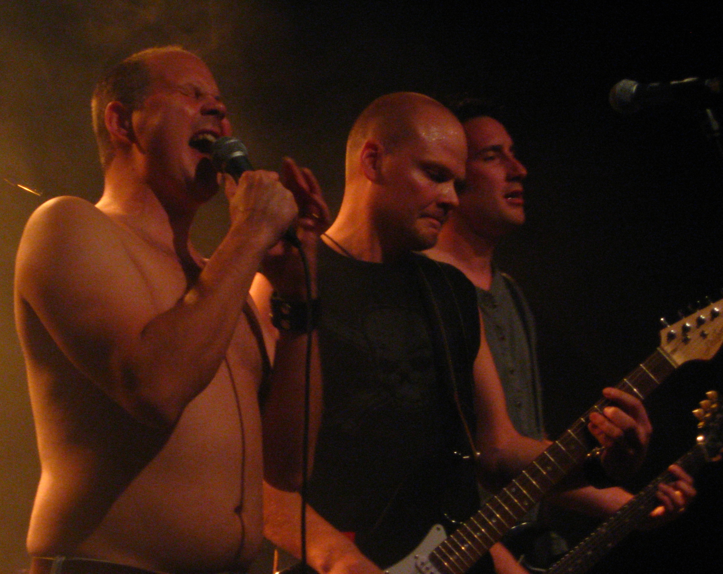 Radioaktiva Räker spelar på Beat Butchers 25-årsjubileum 2009.